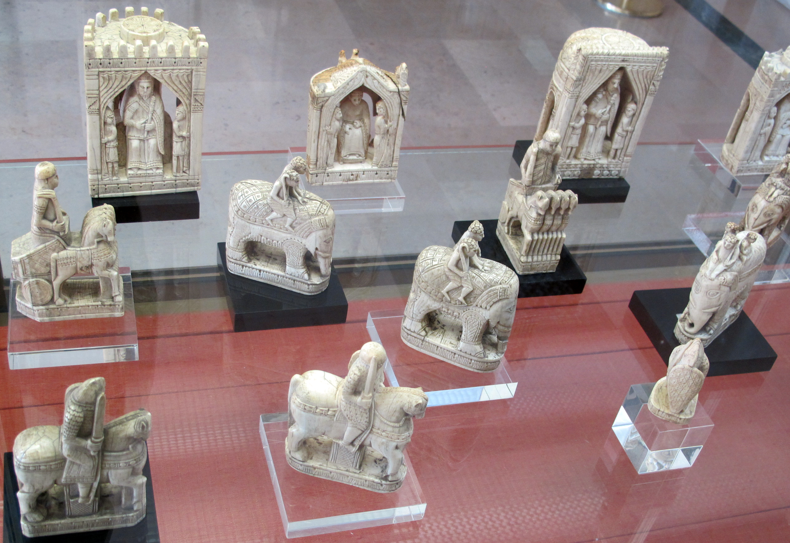 Sedici scacchi detti di carlo magno, avorio, 1090 ca. da tesoro di st.denis